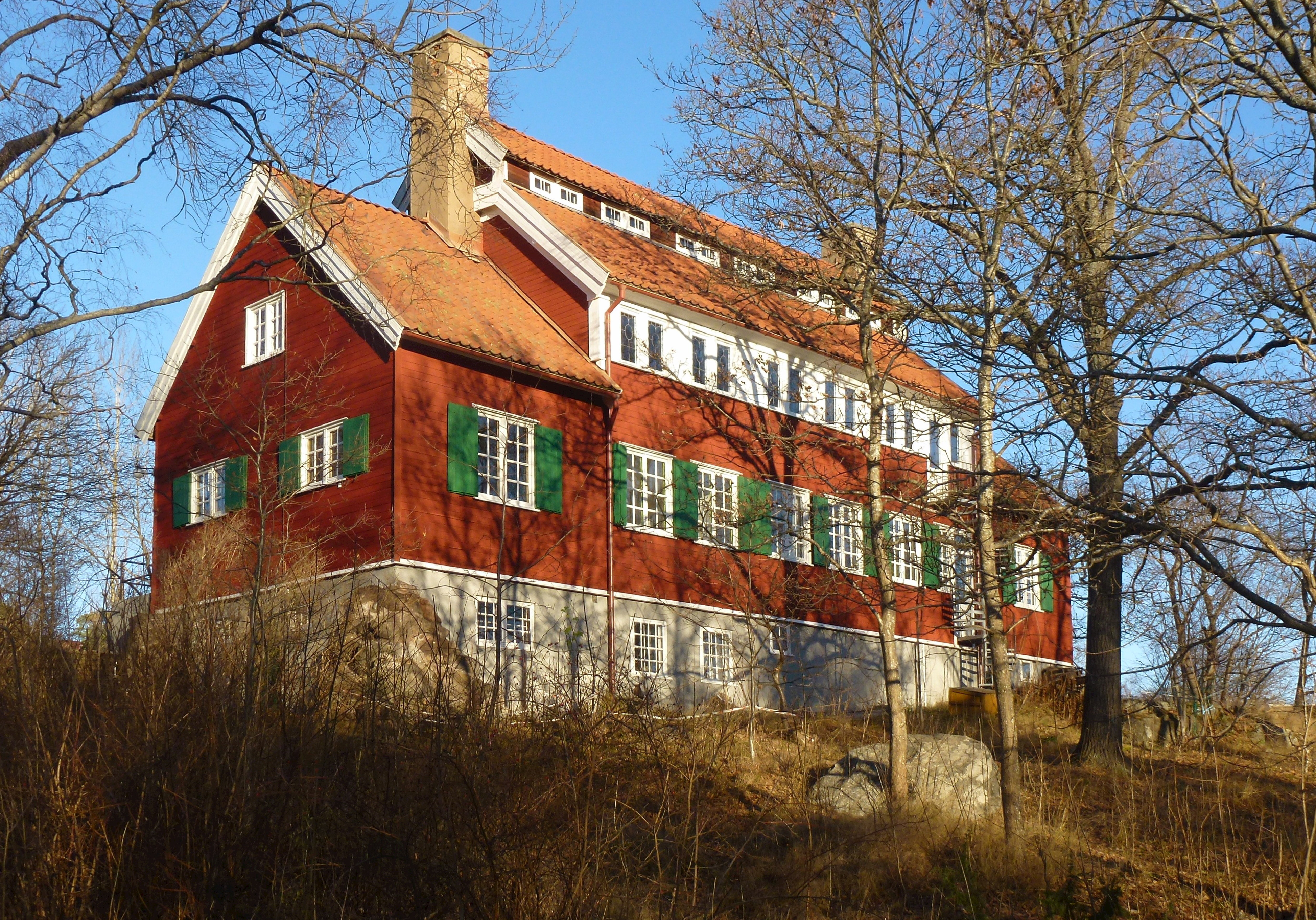 Storängens samskola, Värmdövägen 1976, arkitekt Ivar Callmander